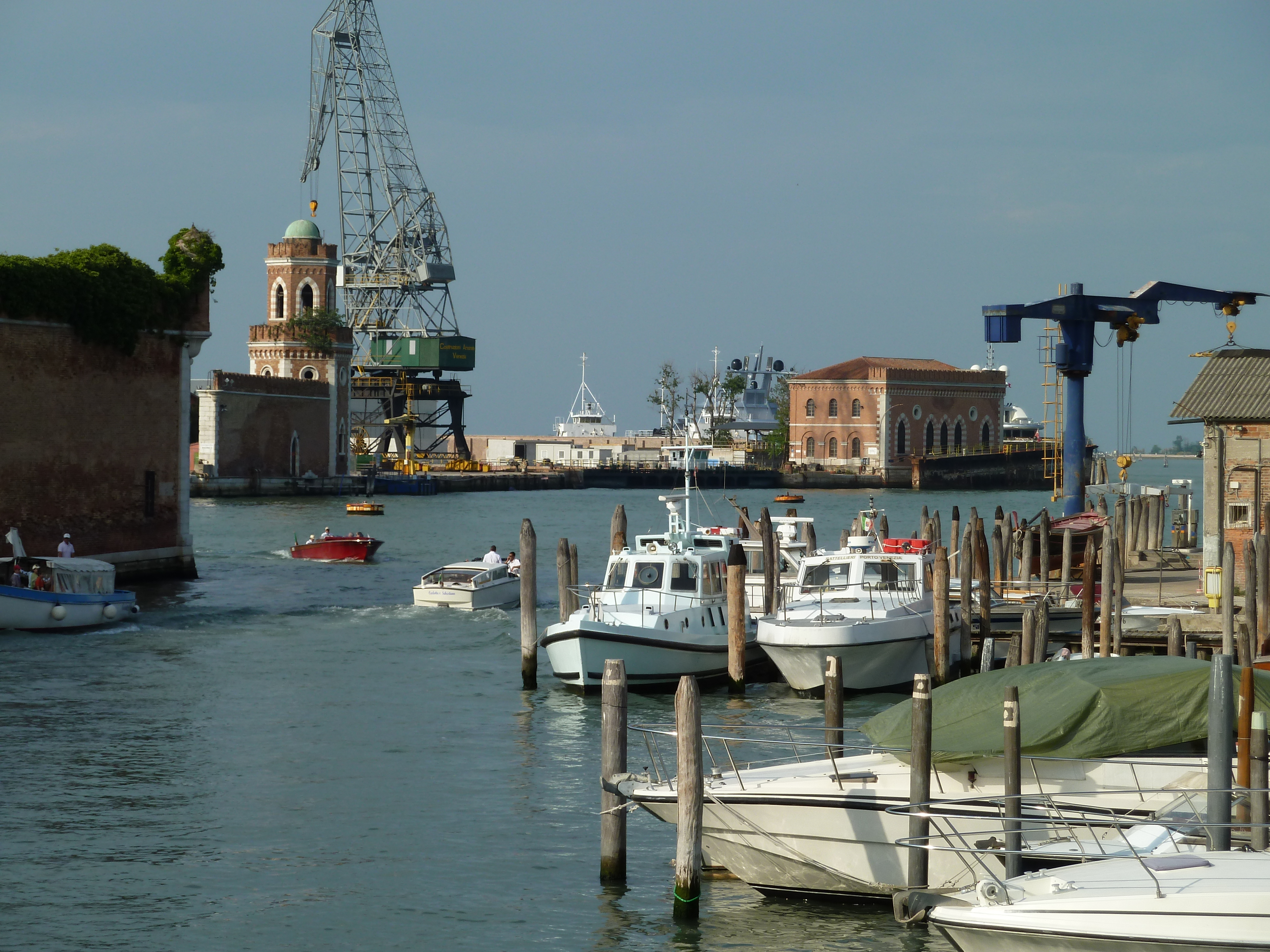 Canale di San Pietro (Venice)